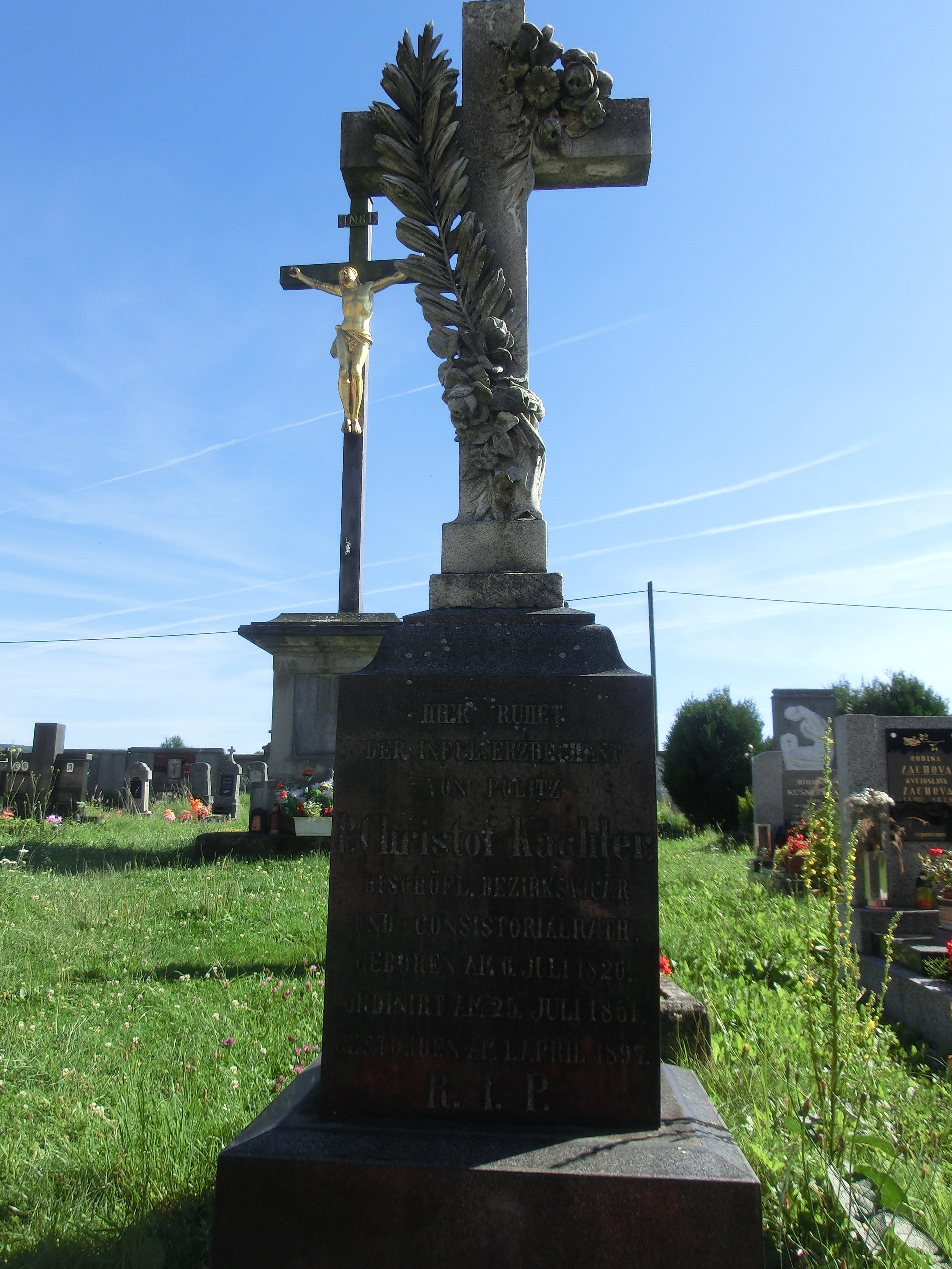 Náhrobek Kryštofa Kachlera 11. infulovaného arciděkana na hřbitově v Horní Polici